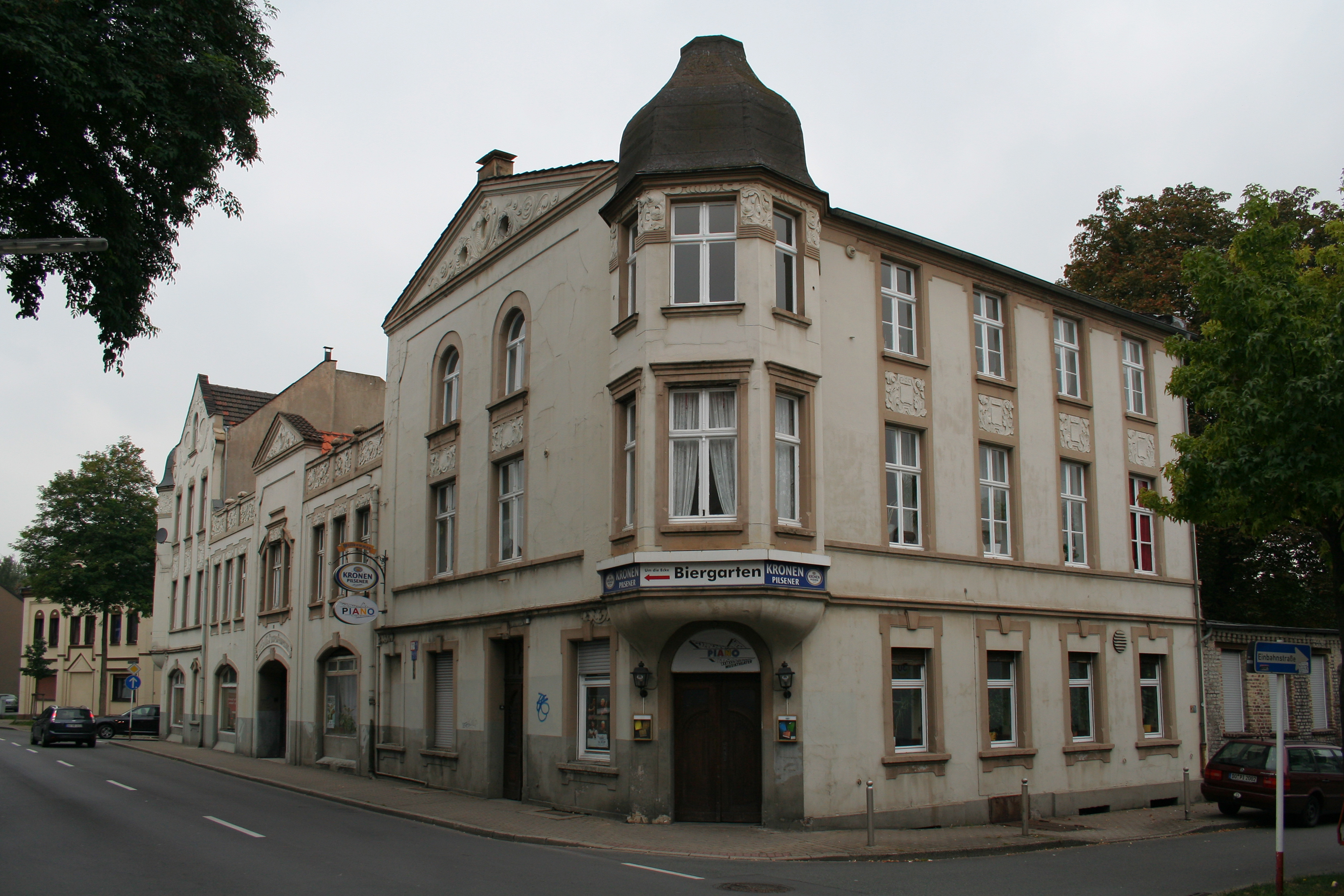 Gebäude des Musiktheaters Piano, ehemalige Gaststätte Zum deutschen Haus in Dortmund.